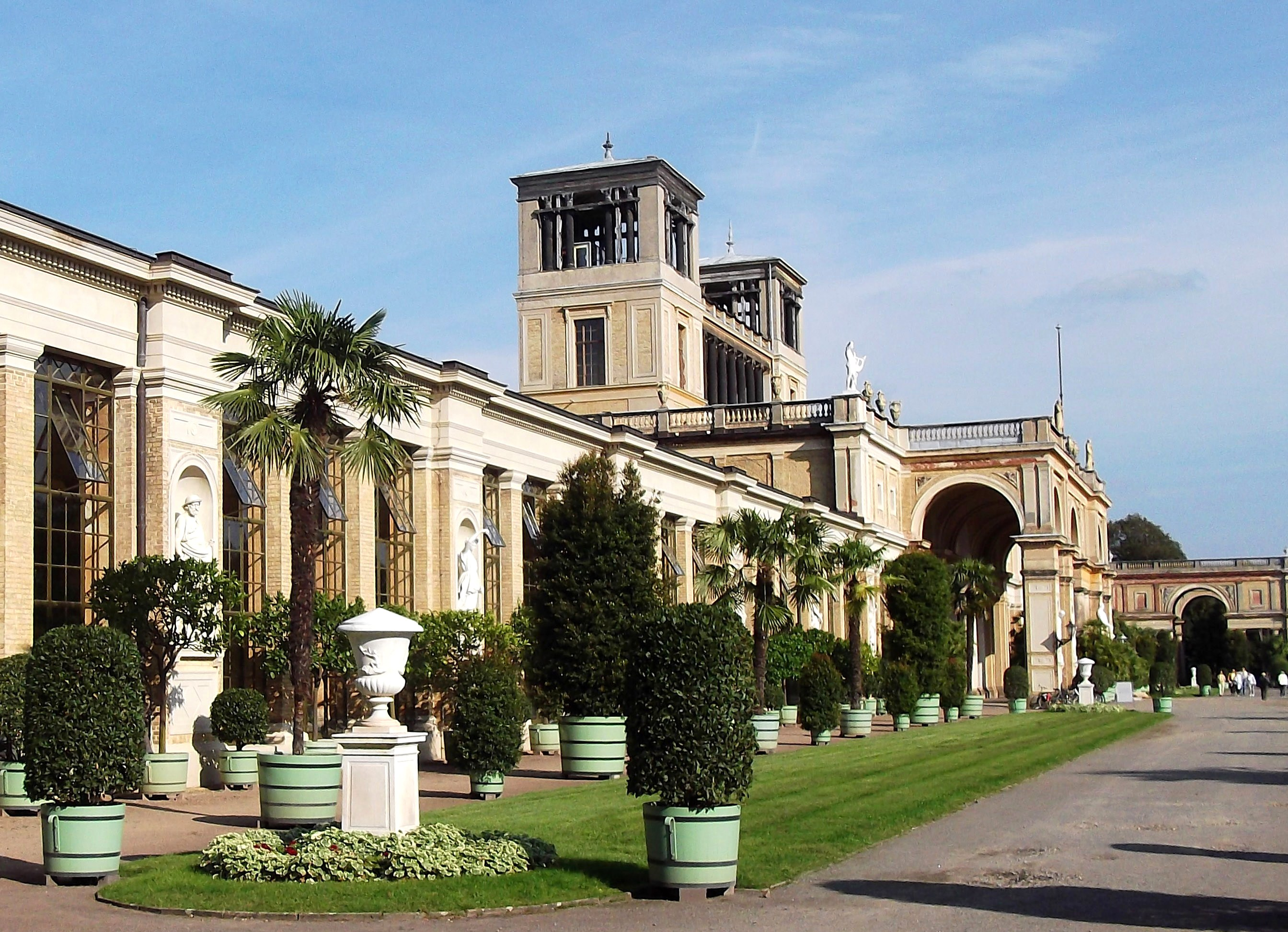 Orangerie Potsdam 2011